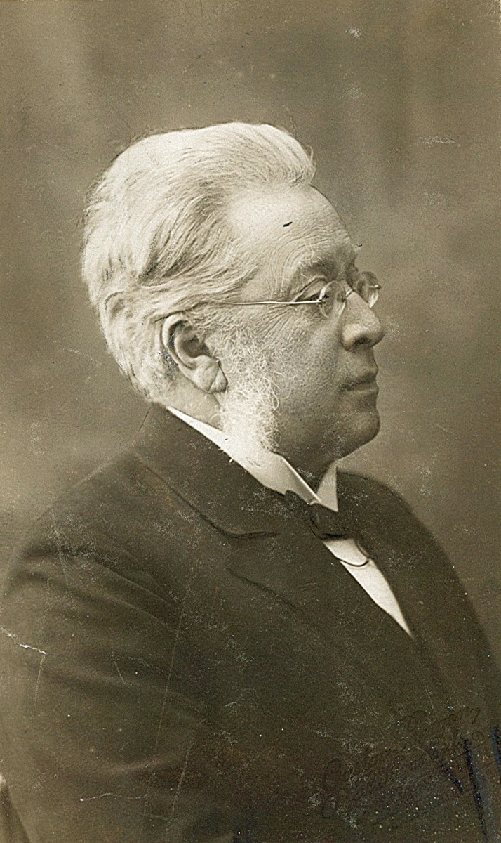 Høyesterettsasessor Herman Johan Foss Reimers, ca. 1920.